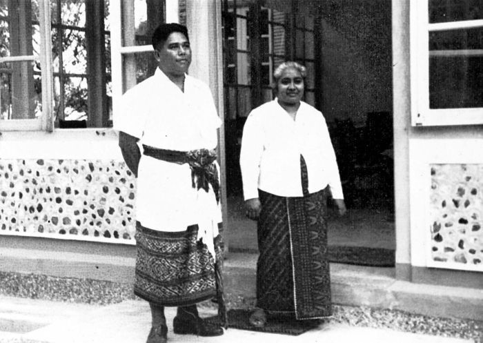 Repronegatief. De raja van Baun (Timor) en zijn echtgenote.